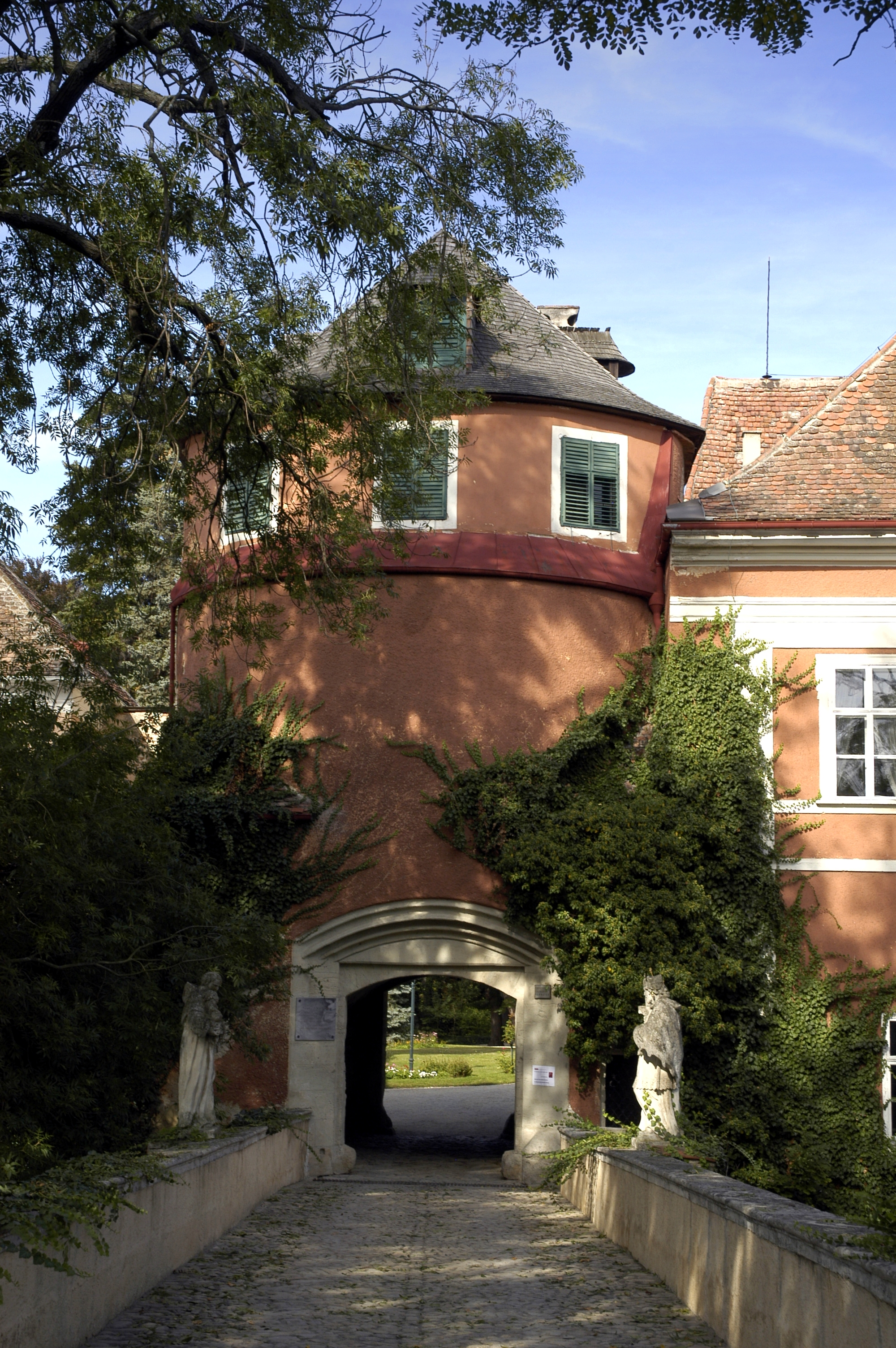 Schrattenthal - Torturm des Schlosses Dieses Bild wurde anlässlich des österreichischen Tags des Denkmals 2012 in Niederösterreich eingereicht.